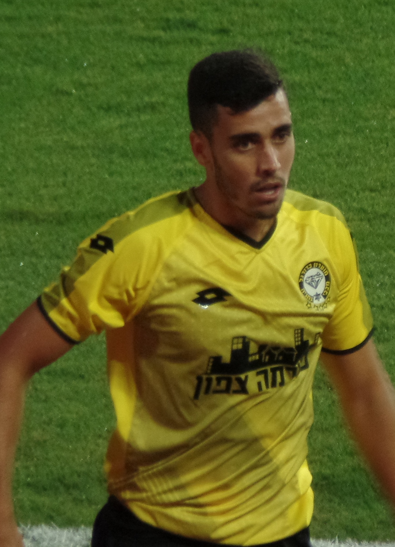 Borja Herrera González